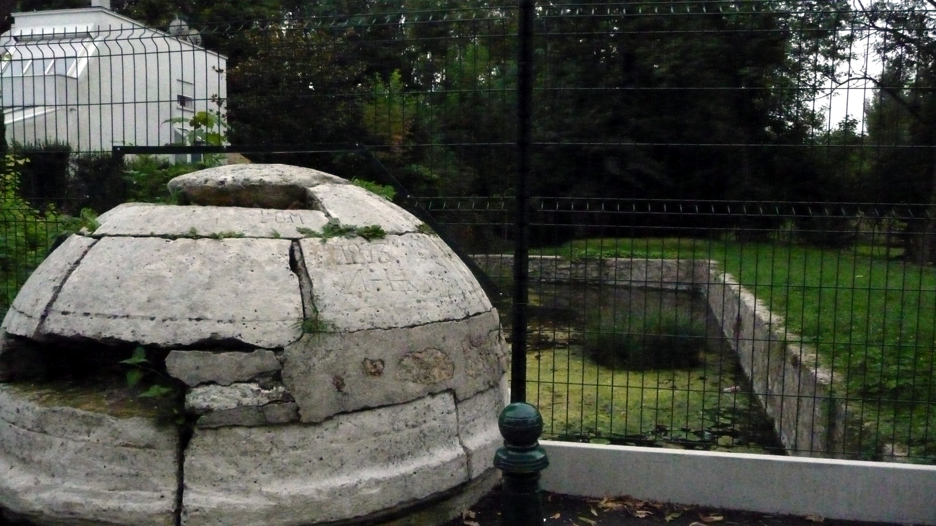 Fontaine de la Pierre Lais, La Queue-en-Brie, France